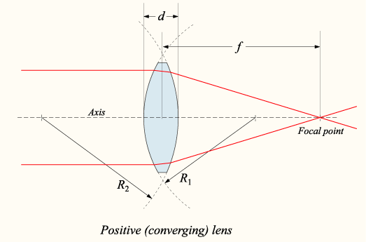 A positive lens.